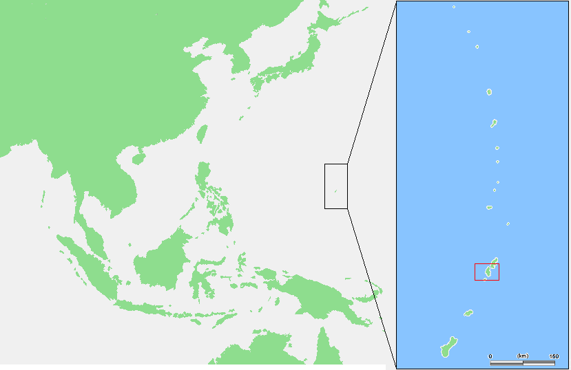 Mariana Islands - Tinian.PNG